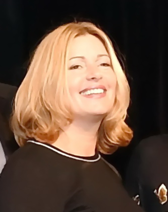 Schauspielerin Karin Thaler bei der Verleihung des Bayerischen Poetentalers an „Die Rosenheim-Cops“.